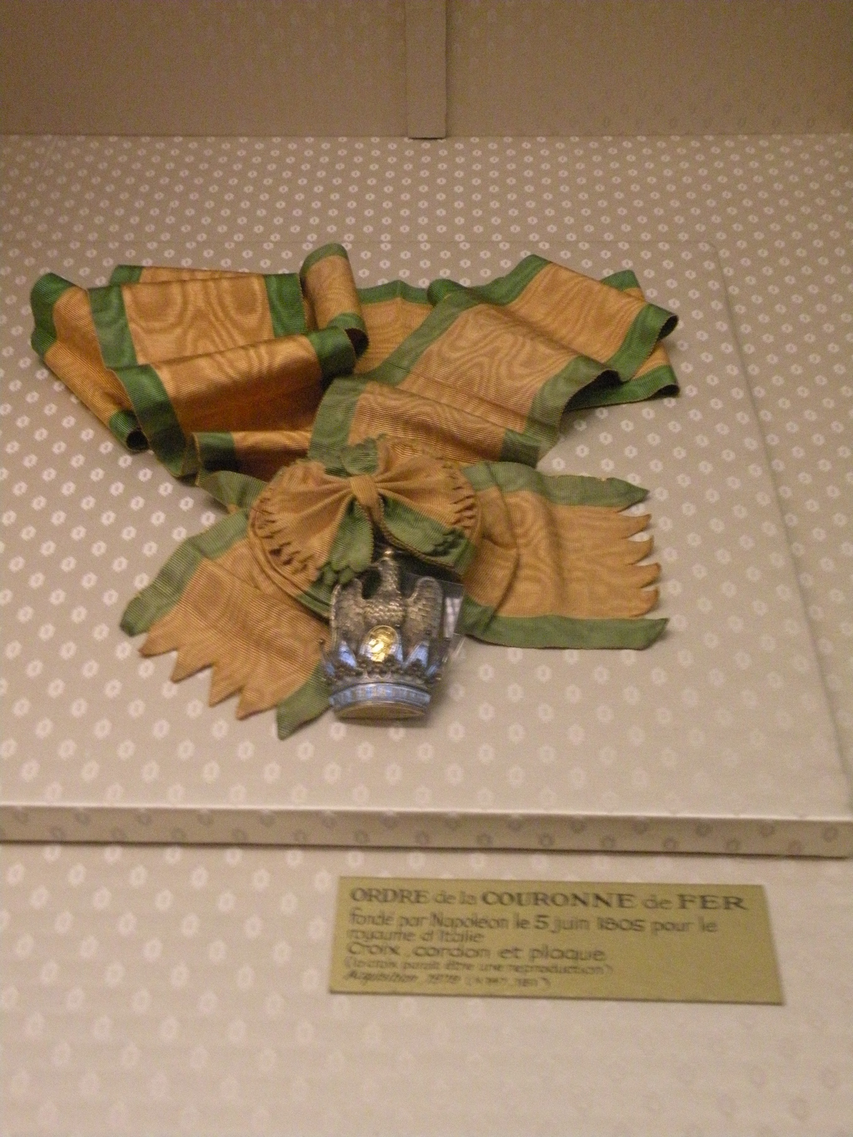 collection château de Fontainebleau